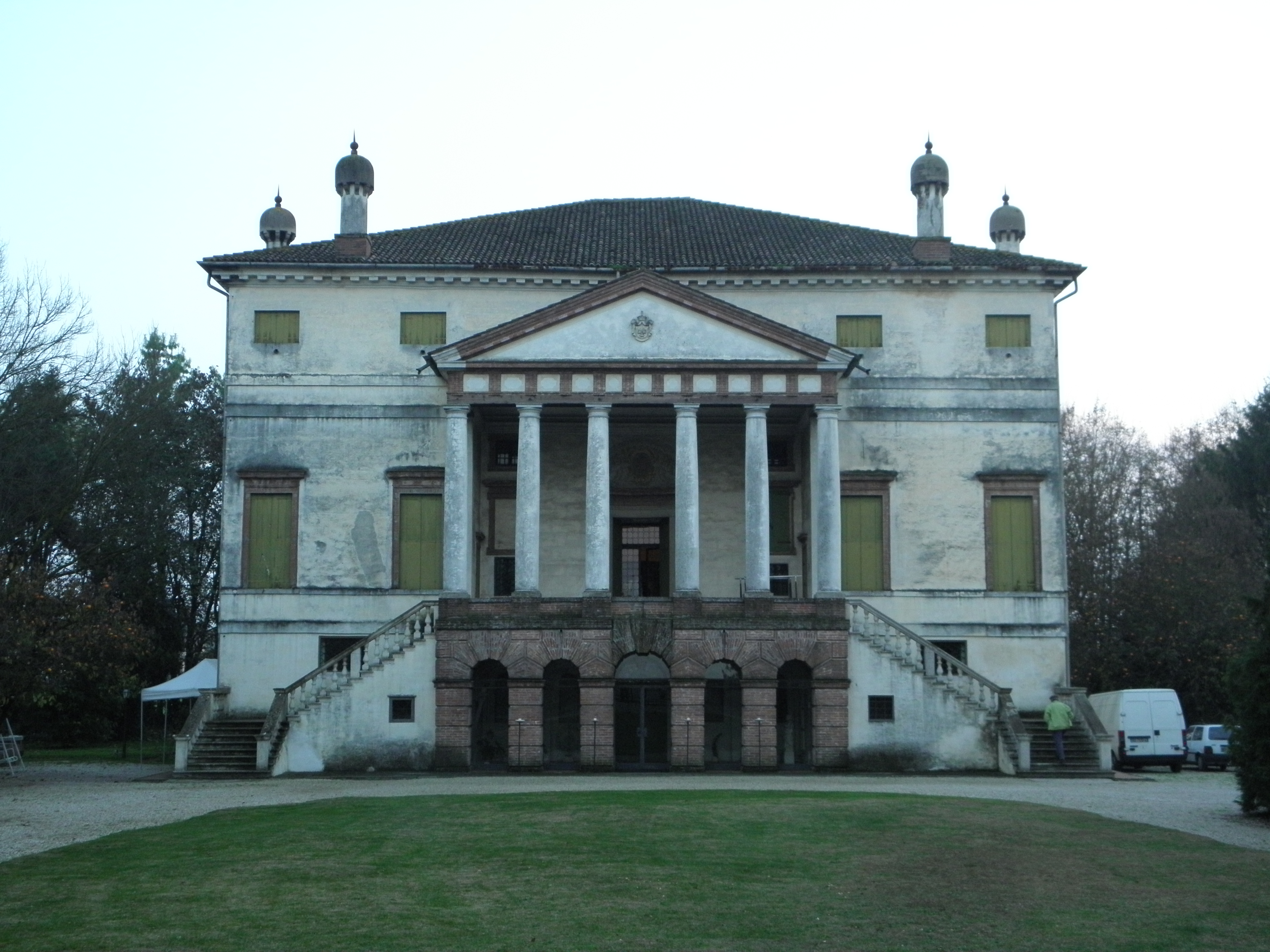 Villa Molin - Avezzù a Fratta Polesine, villa della Carboneria frattense.